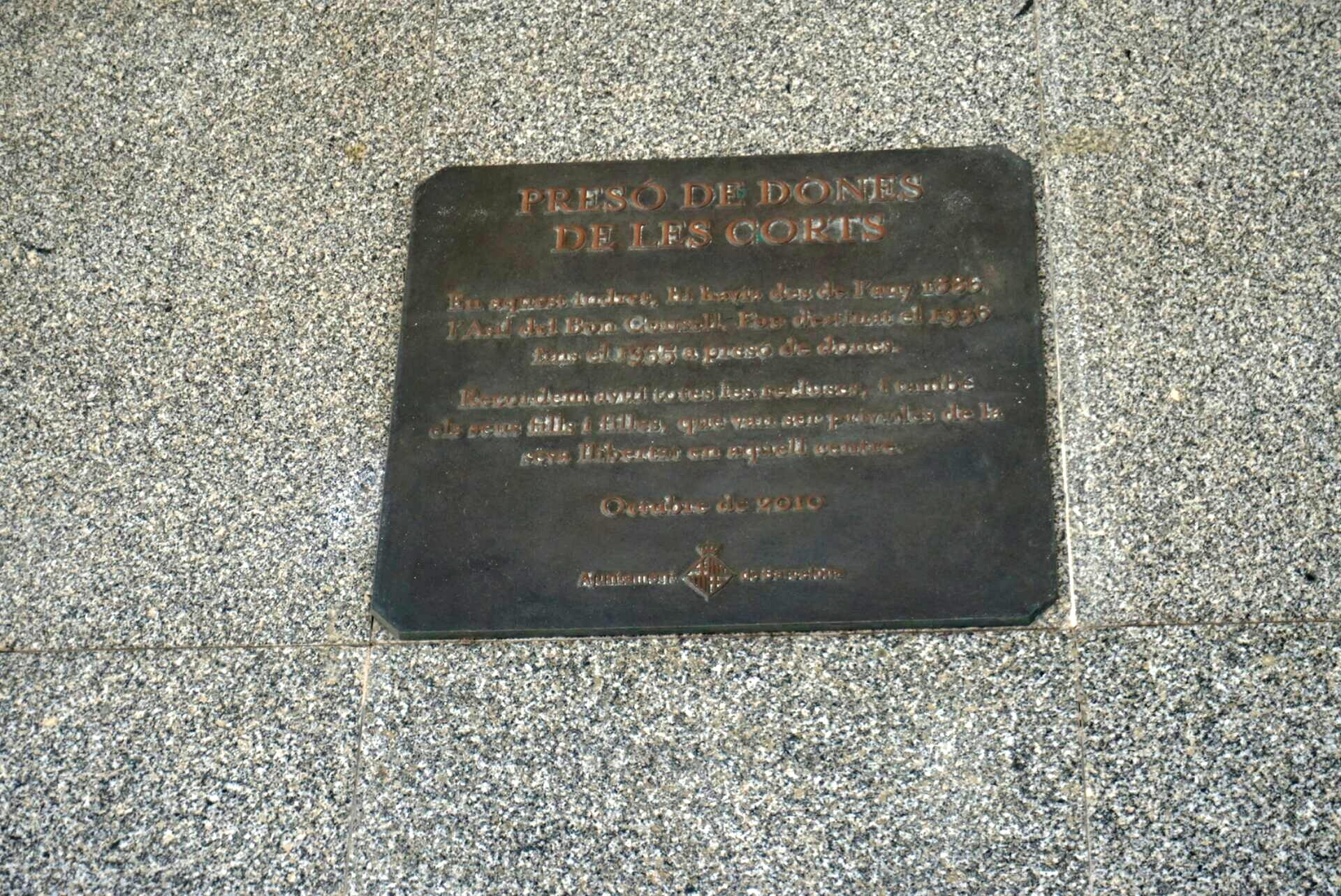 Text de la placa: En aquest indret hi havia des de l'any 1886 l'Asil del Bon Consell. Fou destinat el 1936 fins el 1955 a presó de dones, recordem avui totes les recluses i també els seus fills i filles que van ser privades de la seva llibertat en aquest centre Octubre de 2010 -Ajuntament de Barcelona